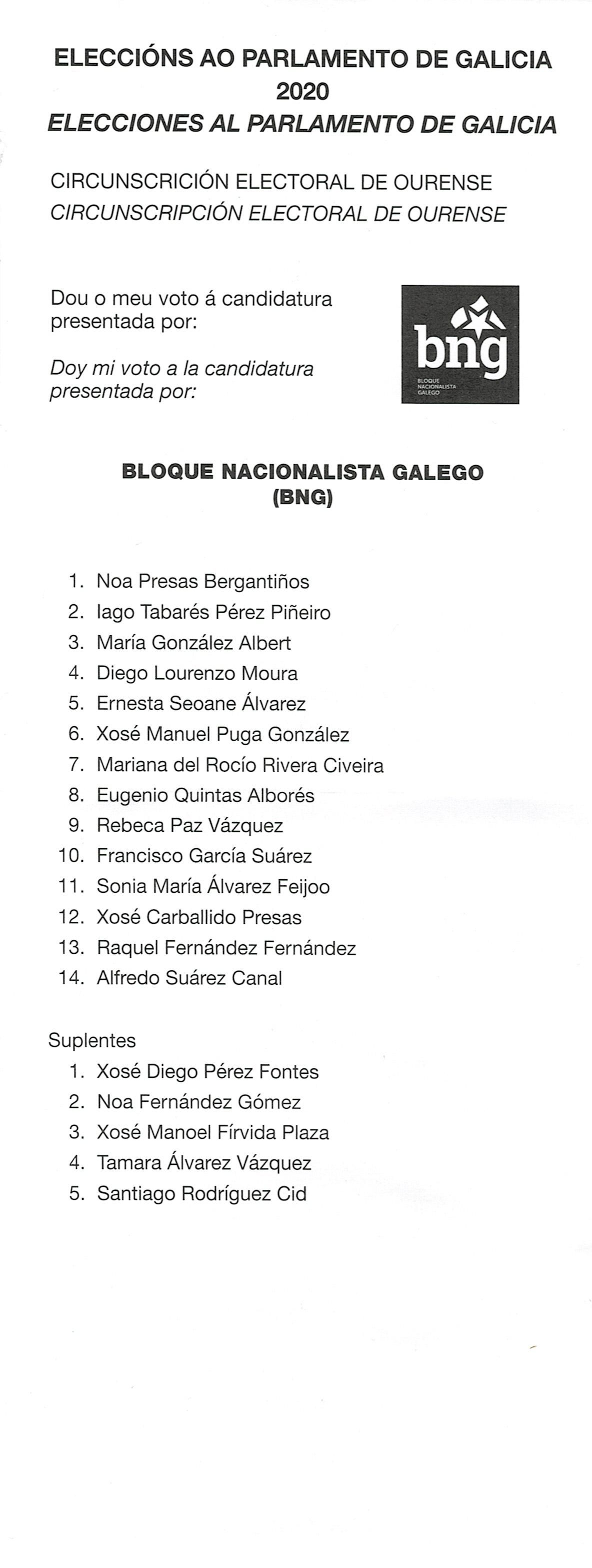 Papeletas electorais Eleccións ao Parlamento de Galicia 2020 pospostas circunscrición electoral de Ourense-BNG